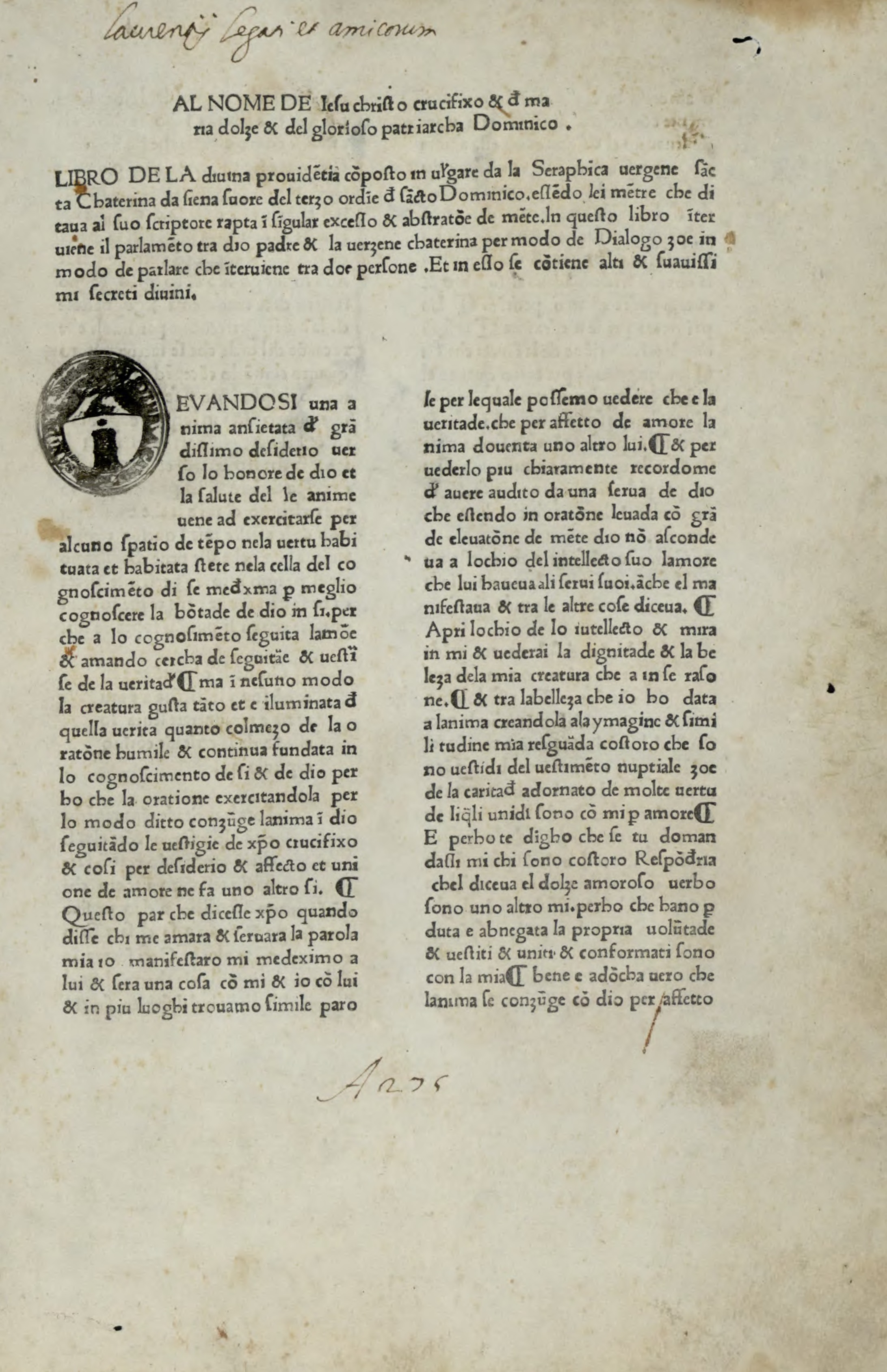 Libro della divina dottrina. - [Bologna] : [Baldassarre Azzoguidi], [circa 1475]. - 147 c. ; a¹⁰, b-c⁸, d⁶, e-f⁸, g⁹, h-n⁸, o⁶, p⁸, q-s⁶, t¹⁰ ; fol. .